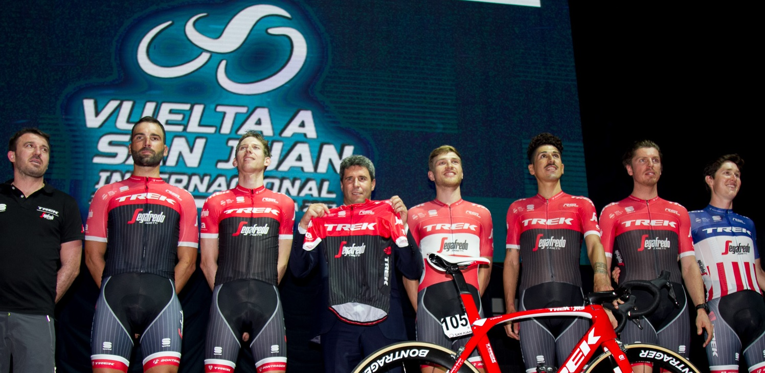 Vuelta a San Juan 2017 - Equipo Trek Segafredo (Estados Unidos) Depicted team: Trek-Segafredo